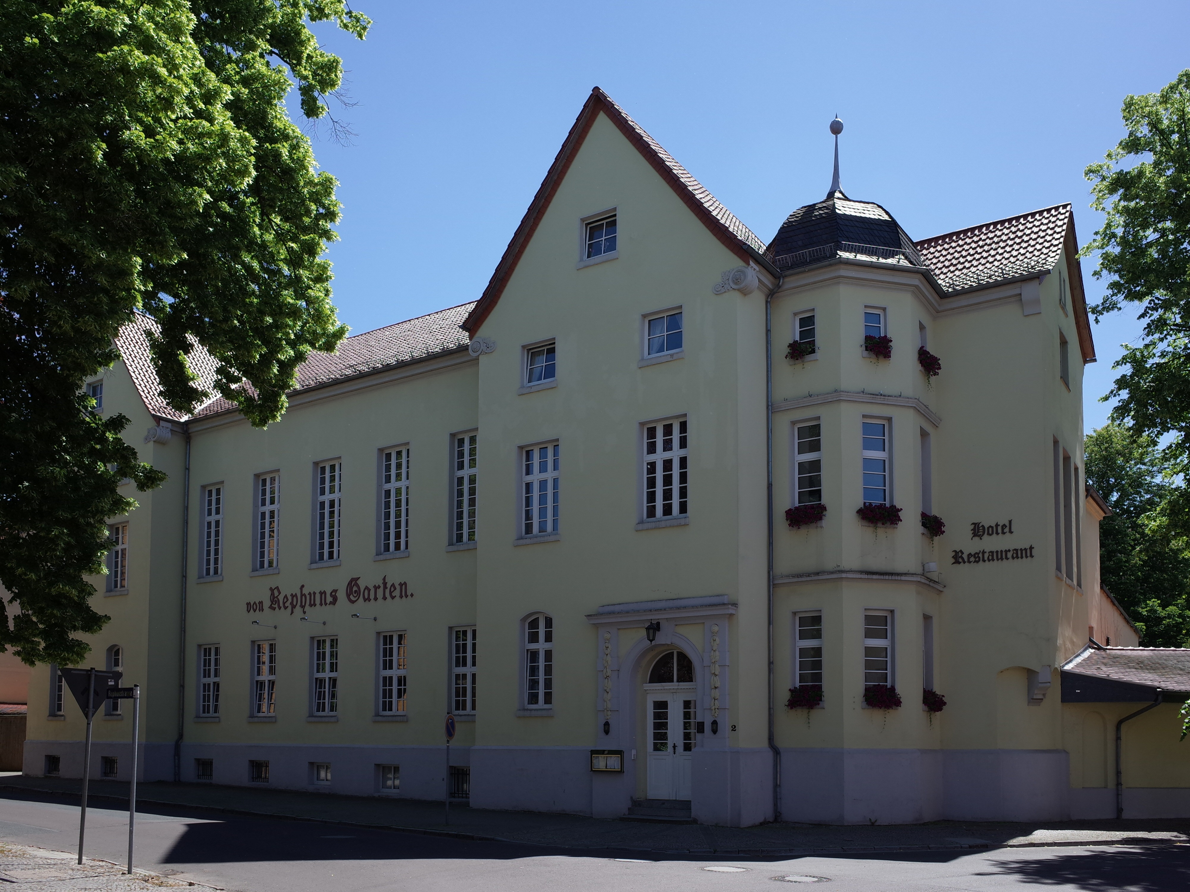 Zerbst/Anhalt, Rephunstraße 2, Hotel und Restaurant von Rephuns Garten.